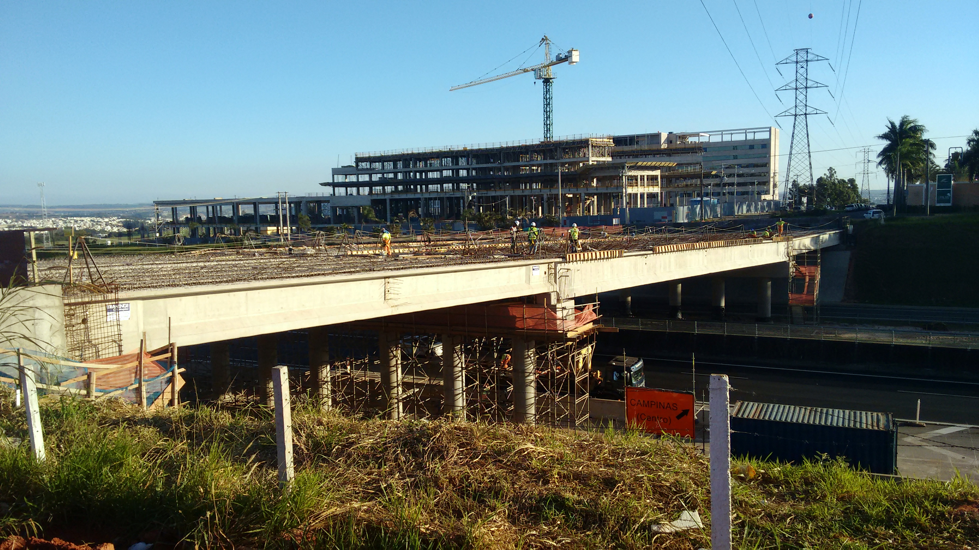 Pontilhão sobre a Rodovia Anhanguera que ligará a Avenida Royal Palm Plaza ao bairro do Jardim Nova Europa em Campinas.